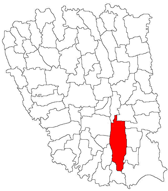 Categorie:Hărţi ale judeţului Galaţi